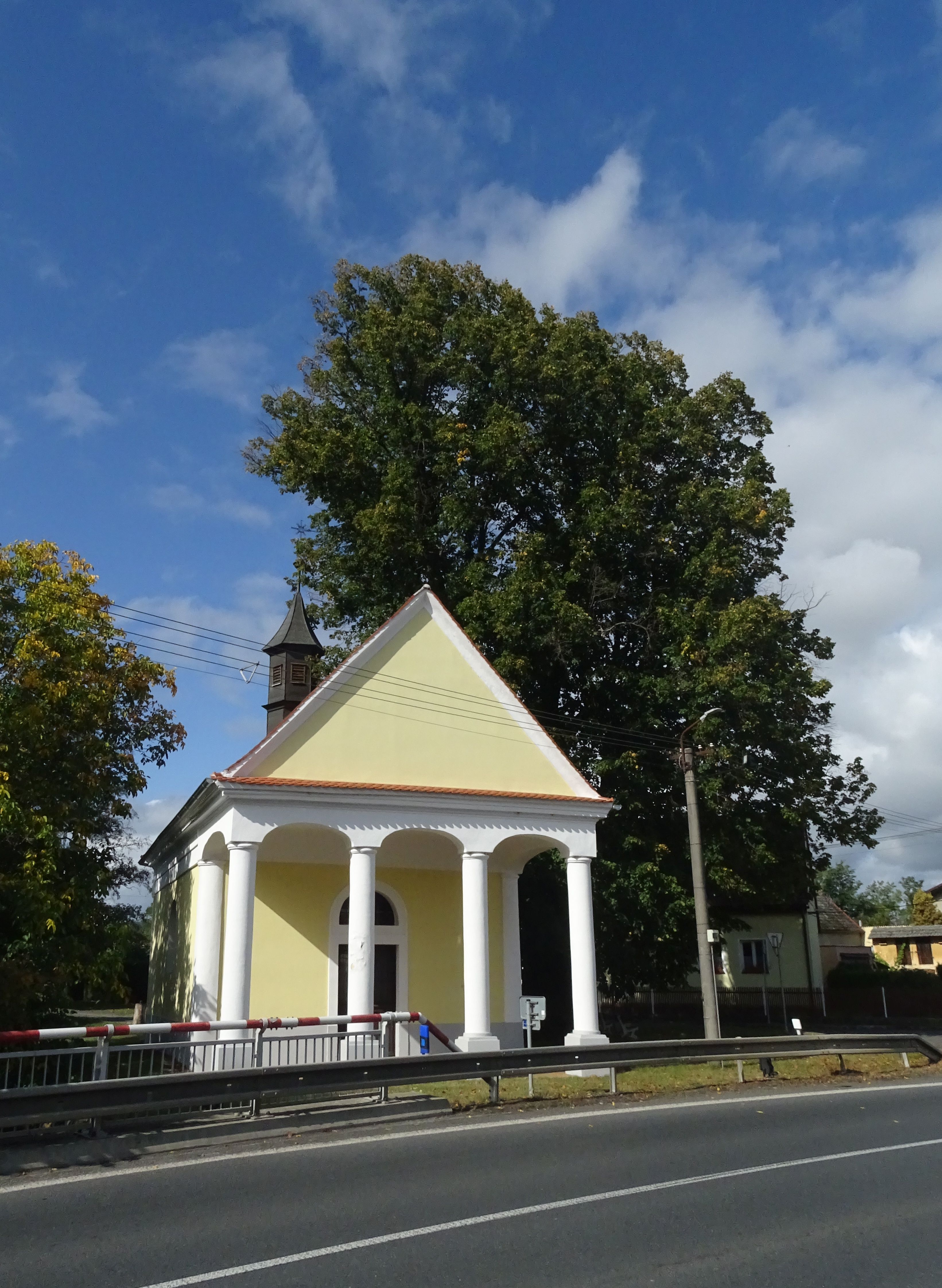 Kaple Narození Panny Marie z roku 1834 a Borovská lípa v Borovech.